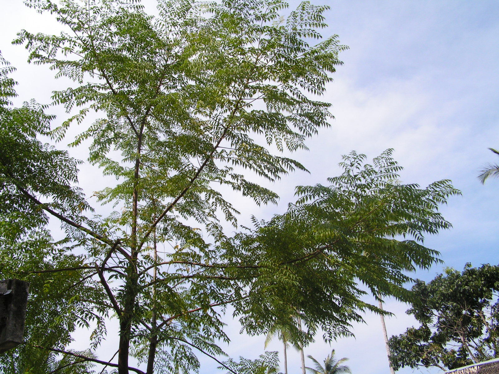 = neem tree in Panglao, Bohol, Philippines